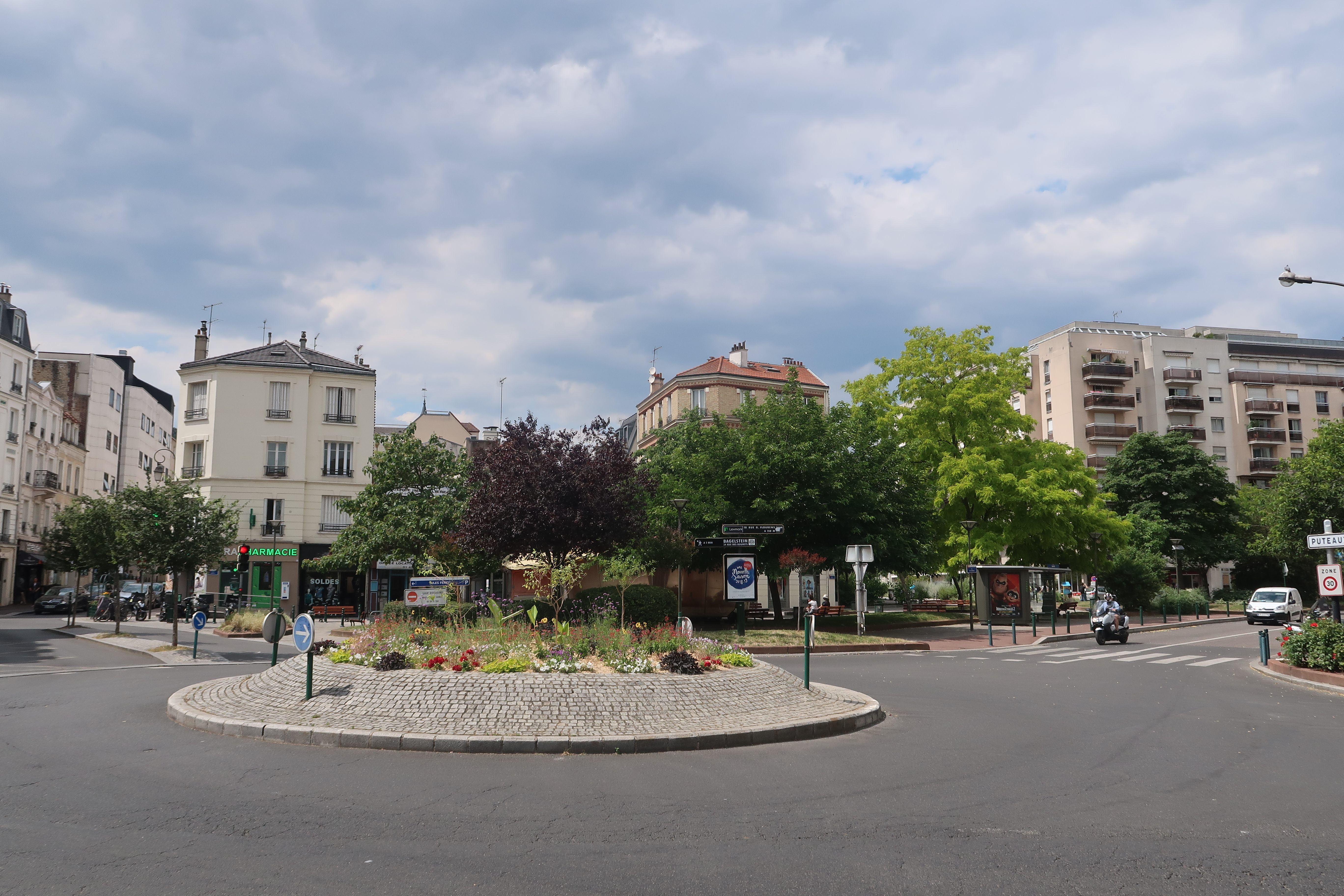 Place Henri-IV à Suresnes (Hauts-de-Seine).